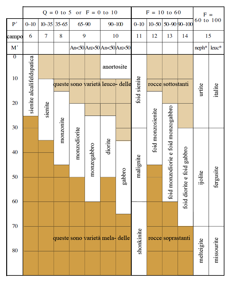 Nomenclatura delle rocce intrusive sature e sottossature in SiO2 in base all'indice di colore